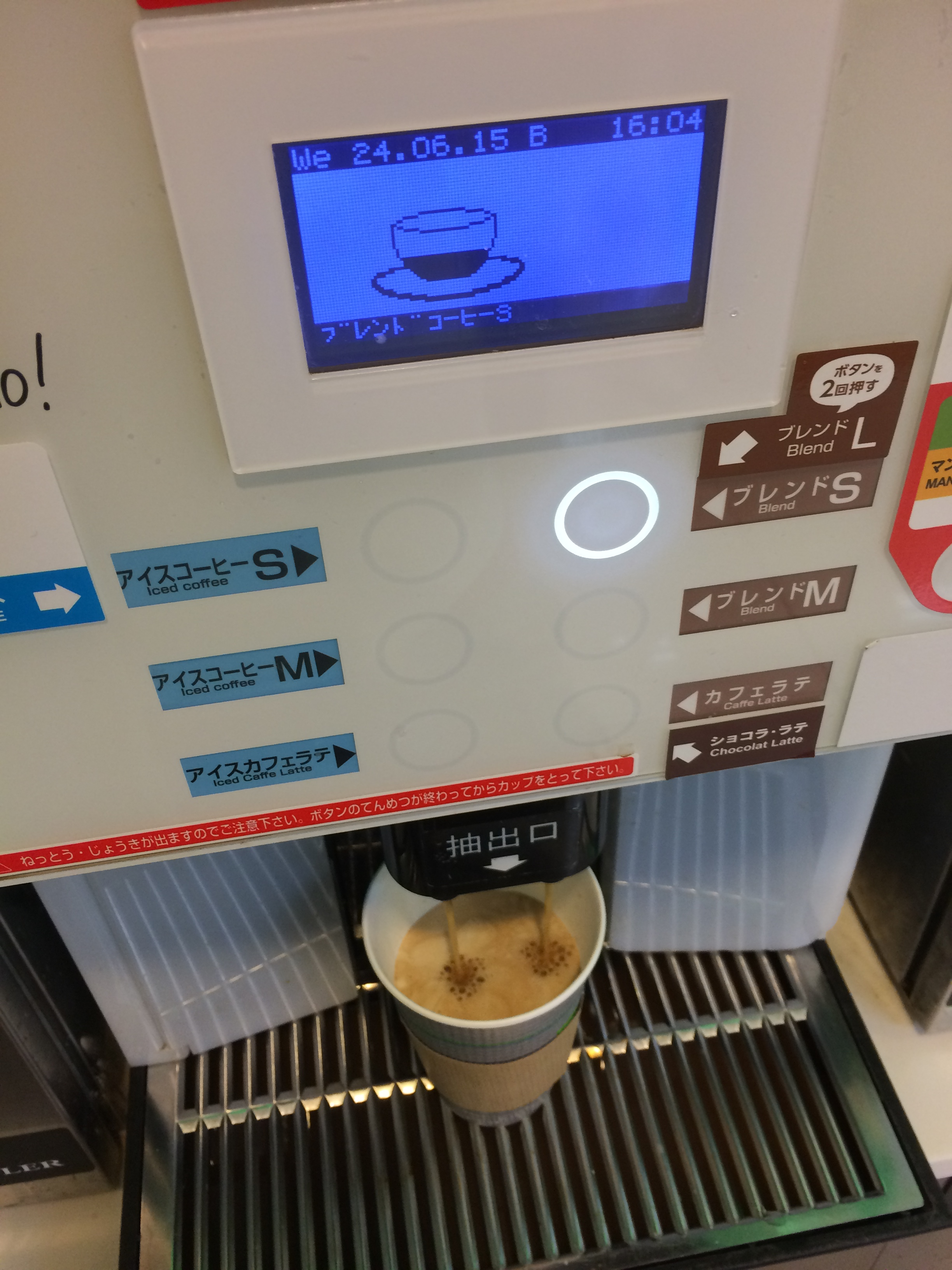 ファミマのブレンドコーヒーLが難しい